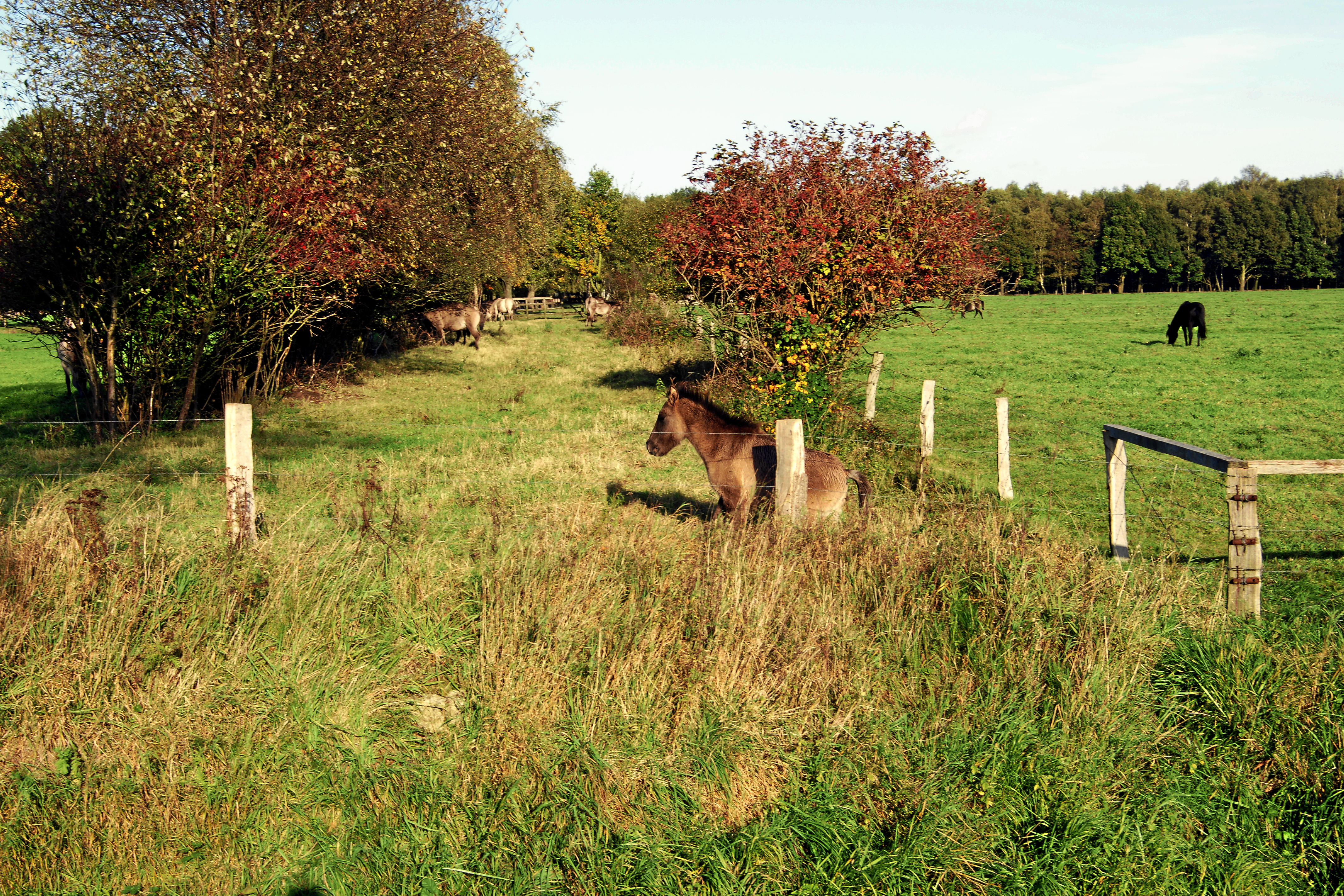 Wildpferde in den Heubachwiesen (NSG COE-029) in Dülmen